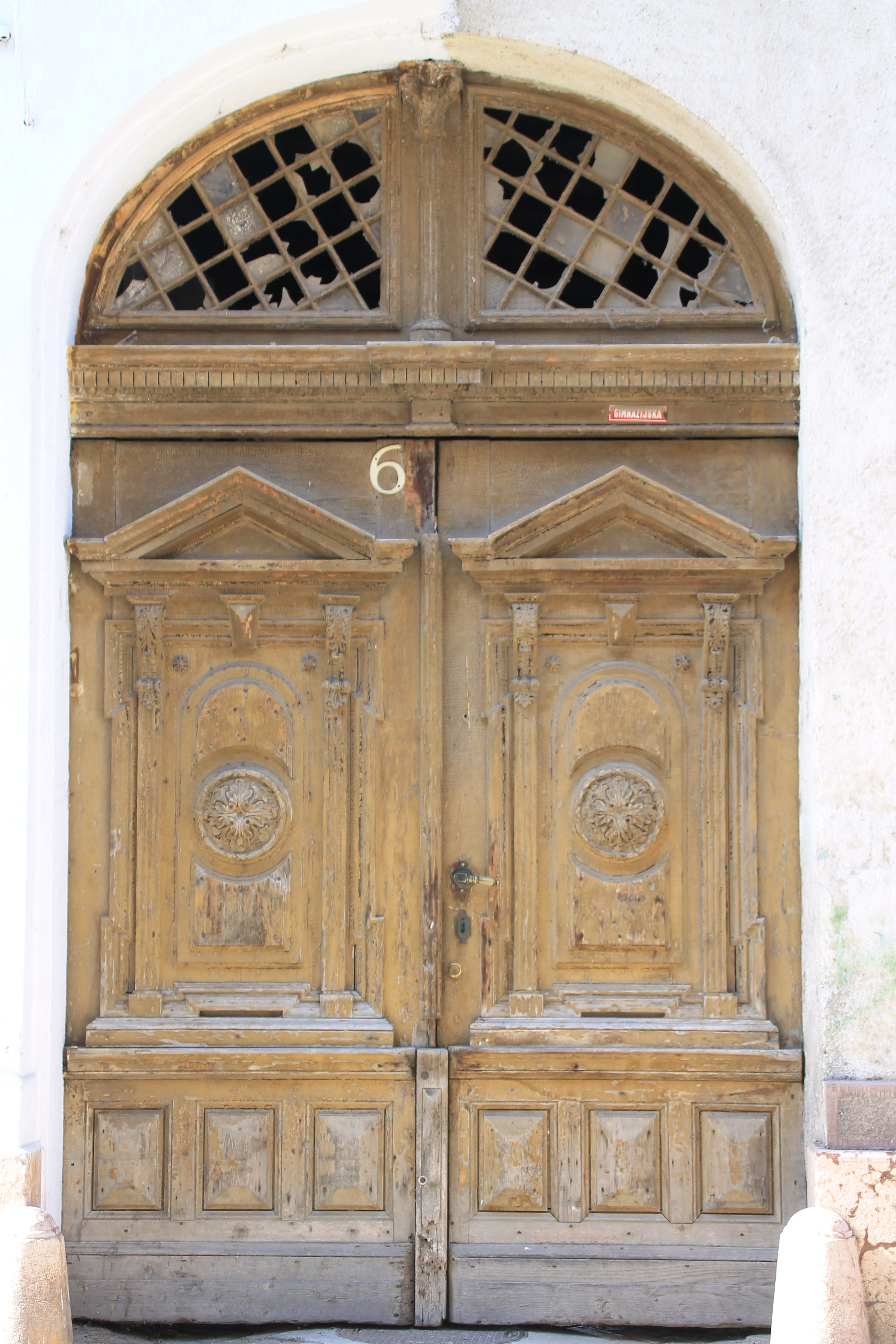 Staro jezgro Zrenjanina